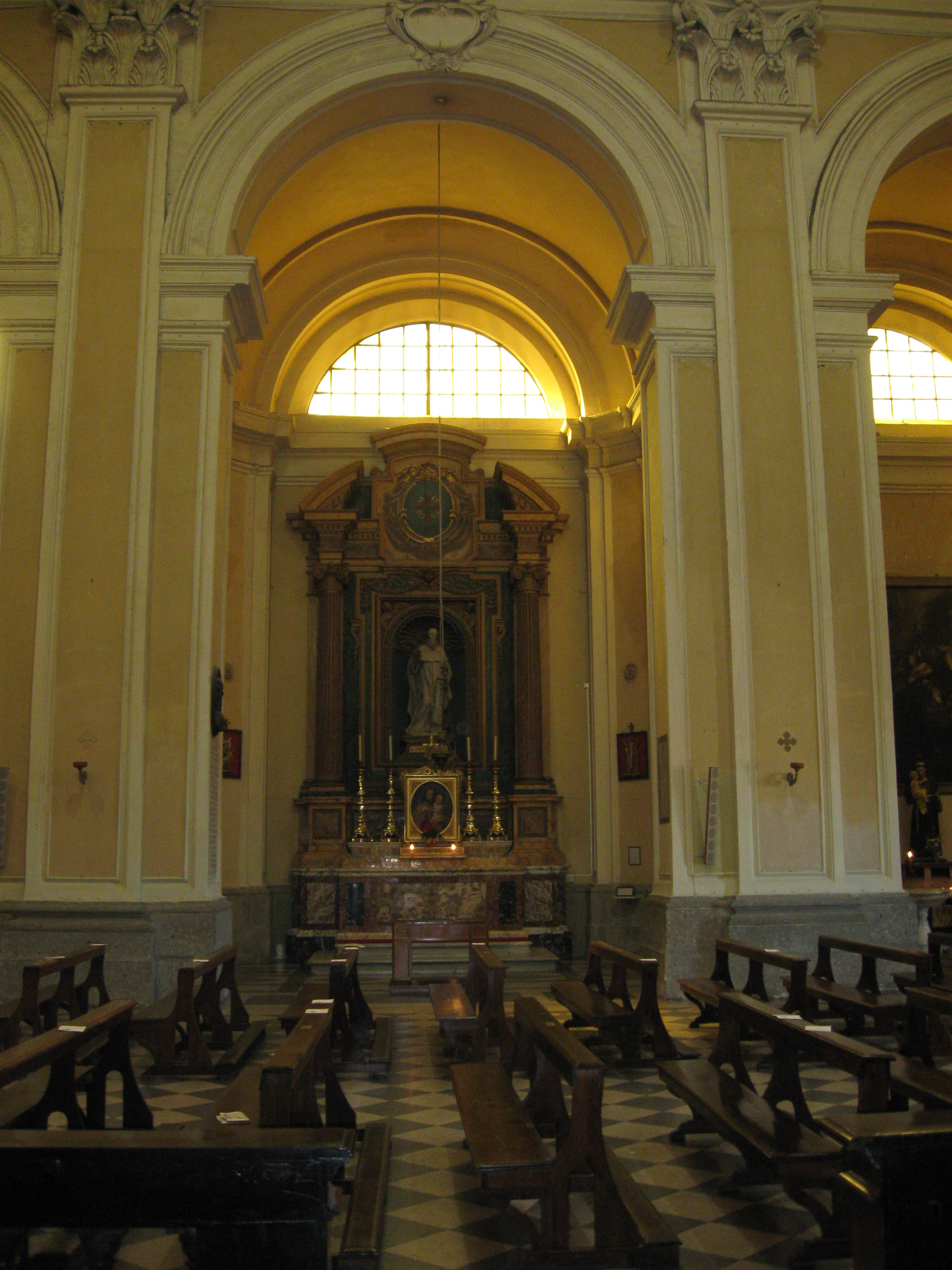 L'altare di Sant'Antonio nella basilica di San Barnaba a Marino (RM)